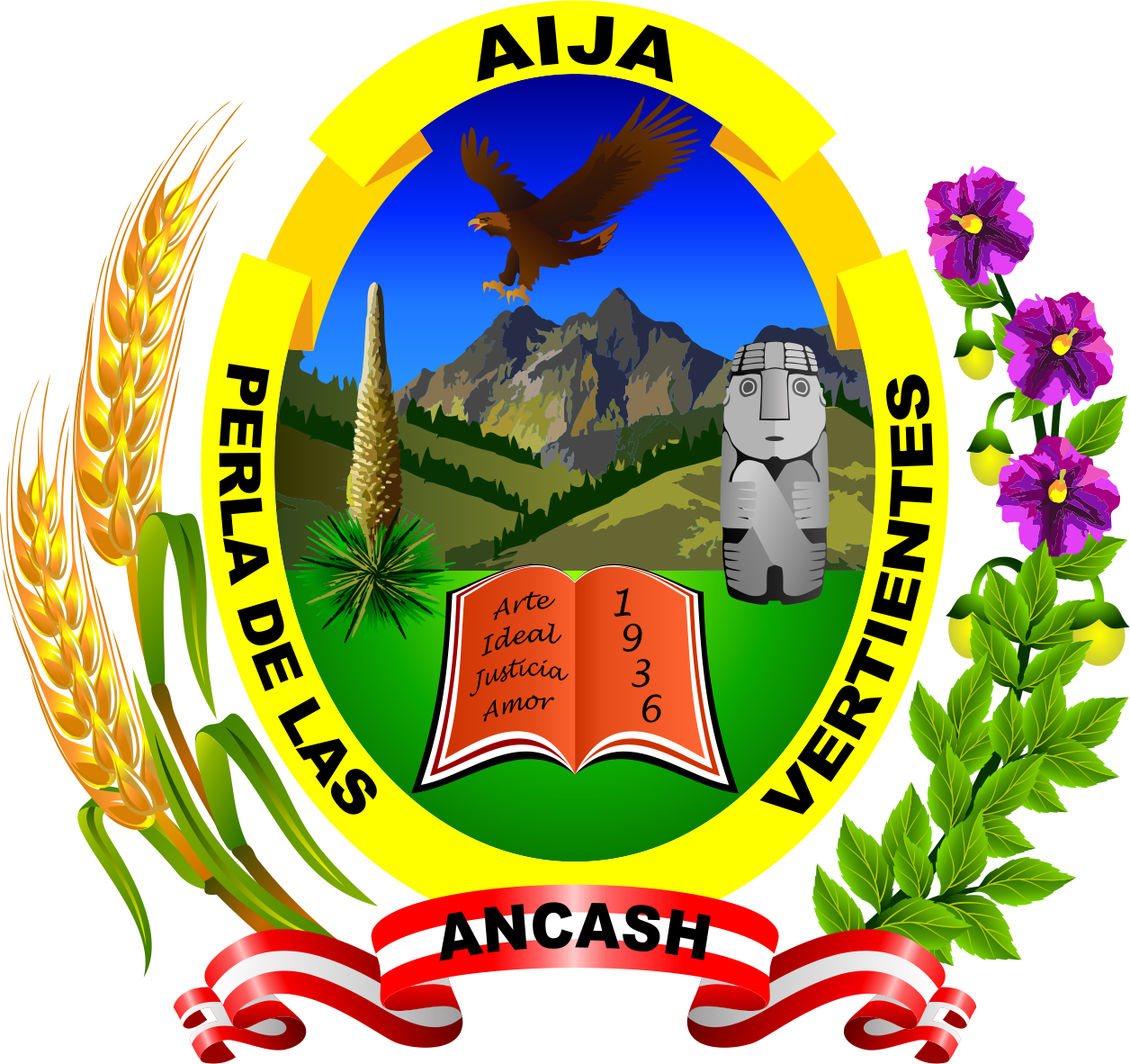 Distrito de Aija - Provincia de Aija - Región Ancash